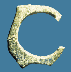 Pendeloque en os du Châtelperronien d'Arcy-sur-Cure d'une largeur de 32 mm. Grotte du Renne, couche X (Chronologie des grottes d'Arcy-sur-Cure (Yonne), pp. 38-39)